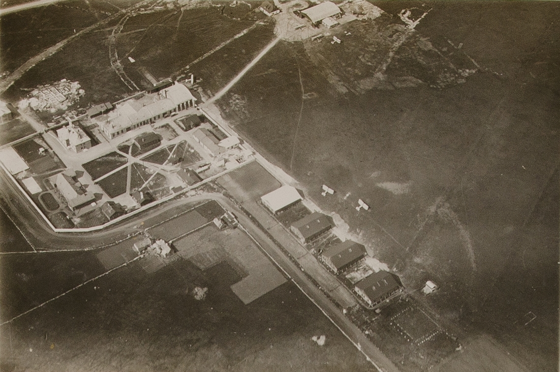 Lennuvaade, Lasnamäe lennuväli., AM F 32539:70, Eesti Ajaloomuuseum.